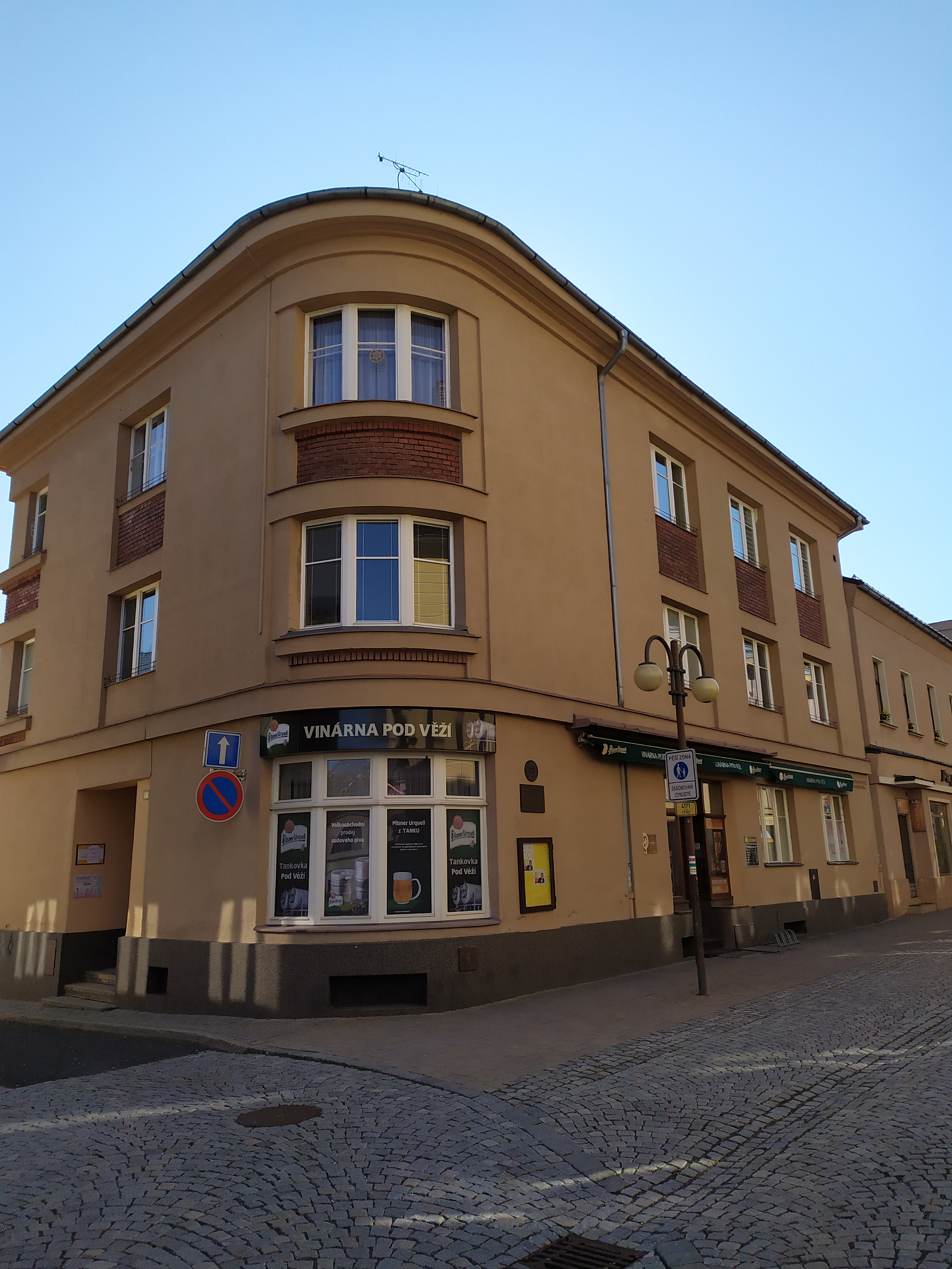 Dům č. p. 162 - dnes Vinárna pod Věží (bydlel zde Jindřich Ambrož)